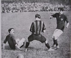 Stade helvètique de Marseille - Cercle athlétique de Paris - Finale championnat de France USFSA 1909